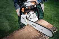 Stihl MS 171 - Motosierra de gasolina - Máxima calidad en el modelo básico, con 1,3 kW.